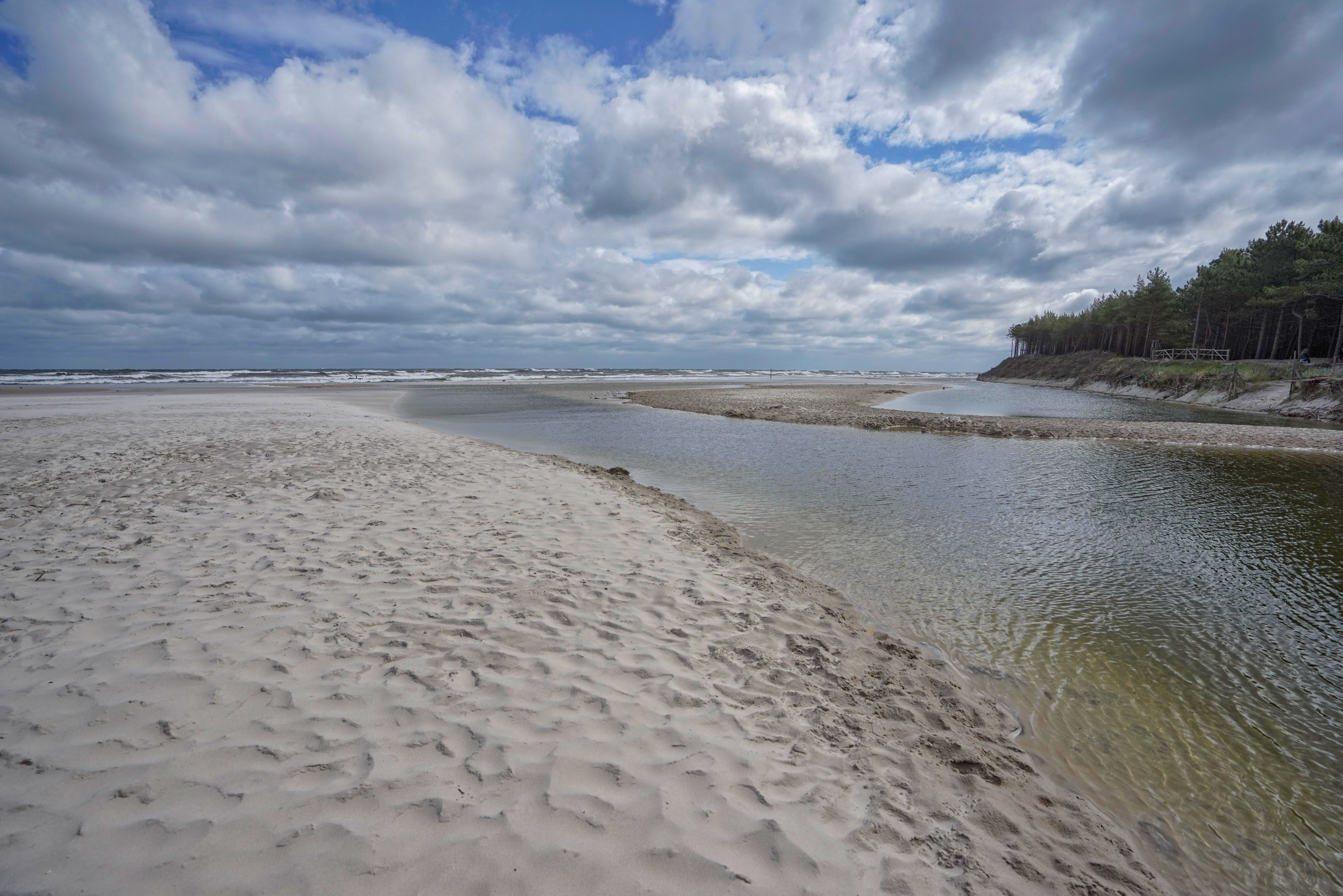 Ujście rzeki Piaśnicy w Dębkach.